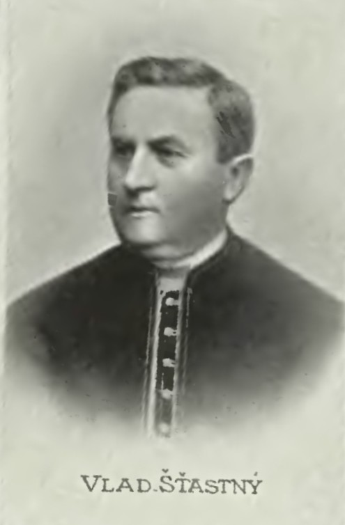 Vladimír Šťastný (1841-1910), Český kněz a básník.